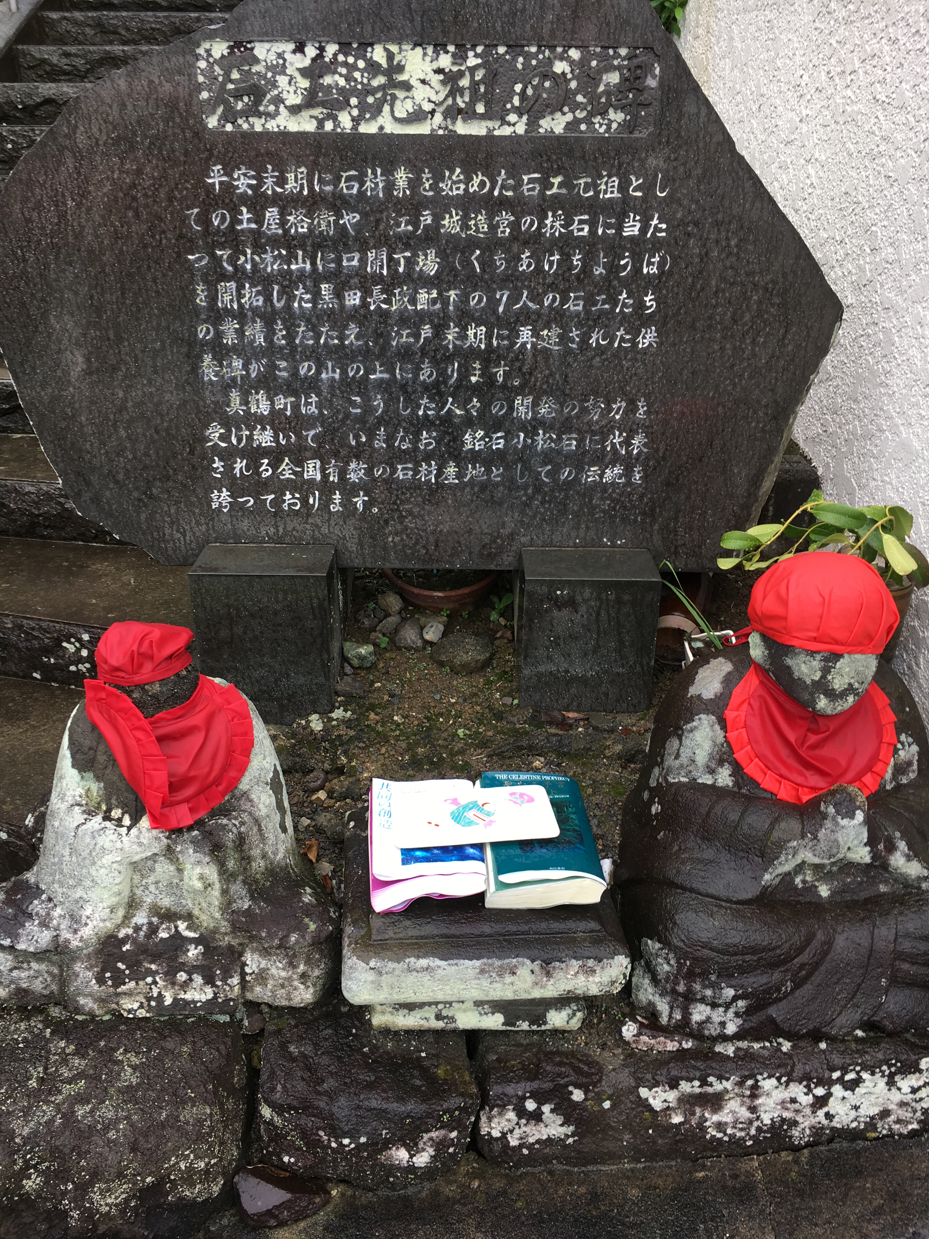 大下の道祖神